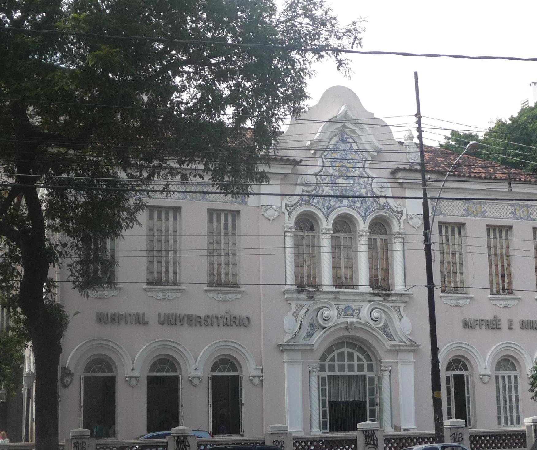 Foto do hospital Gafree Guinle : Hospital Universitário Gaffree e Guinle